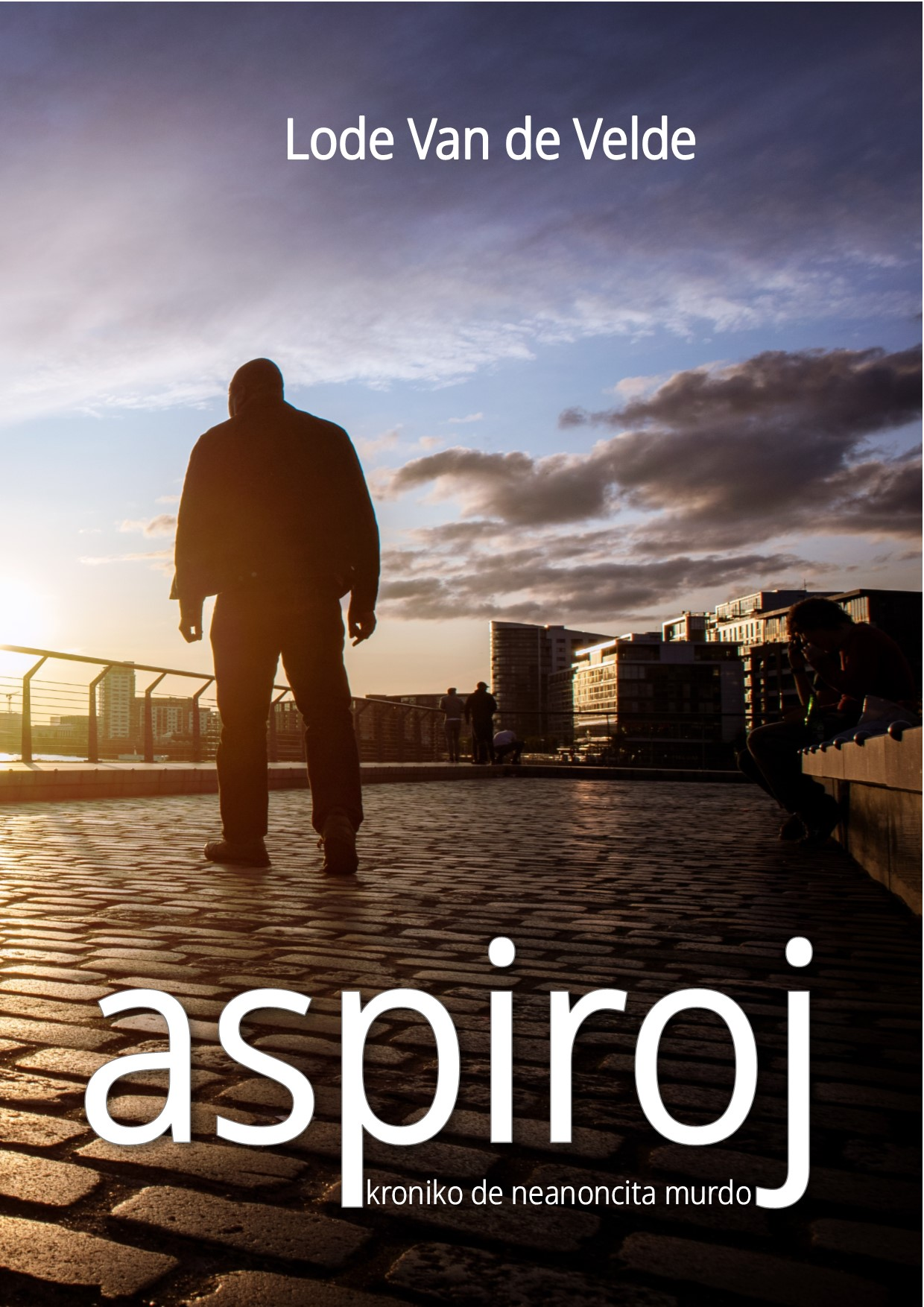 Kovrilo de la libro nomita Aspiroj